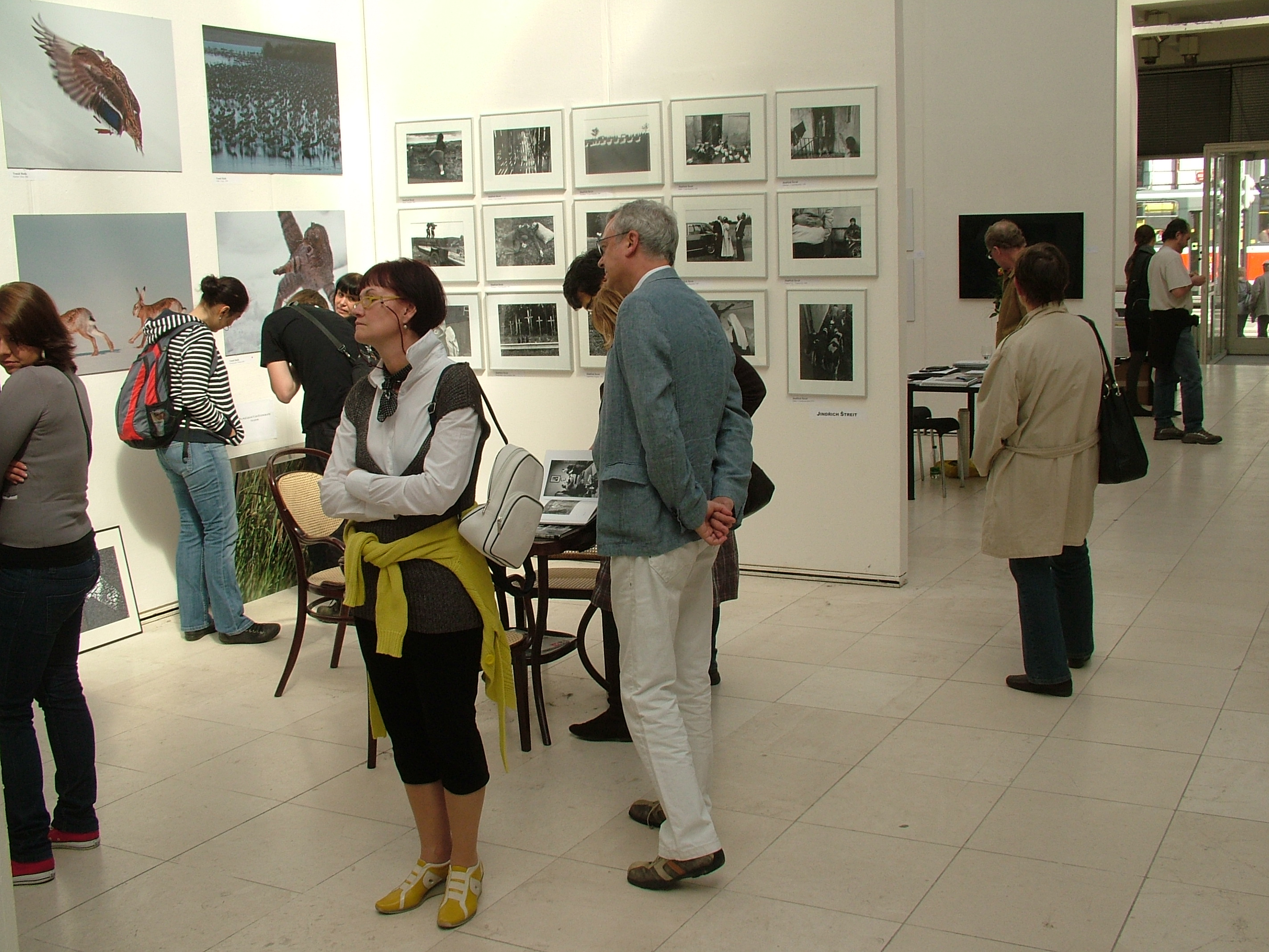 Výstava, festival, Prague Photo 2011 Budova: Mánes, Praha Trvání: od 4. dubna do 10. dubna 2011. Datum: 10. dubna 2011.